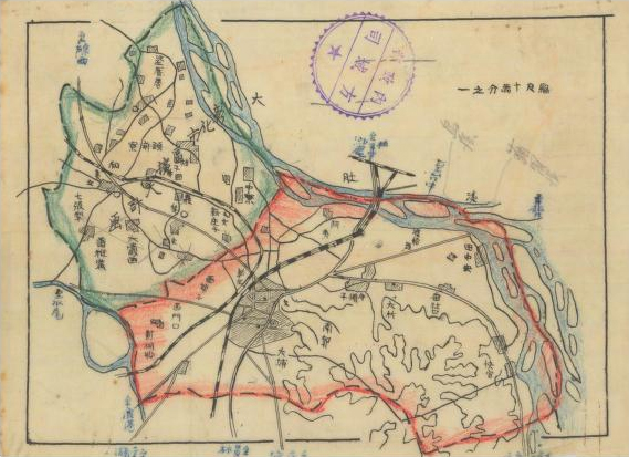 中文（台灣）: 日治時期的彰化市曾計畫合併和美庄擴大彰化市區，但未實現